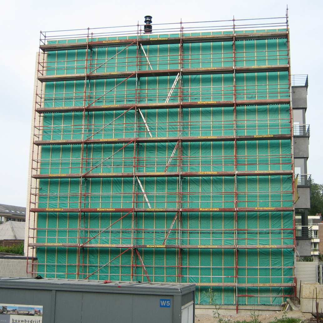 Eng Stee virun engem Giewel.